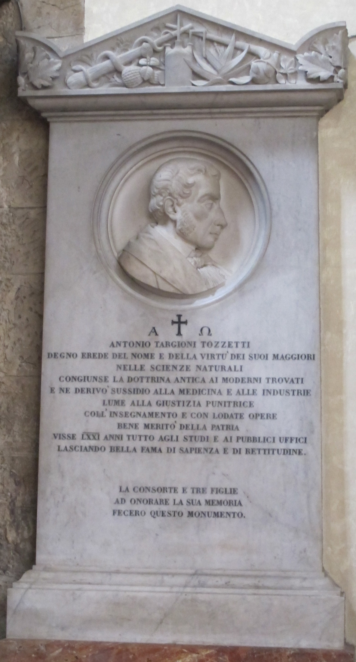 S. croce, tomba antonio targioni tozzetti